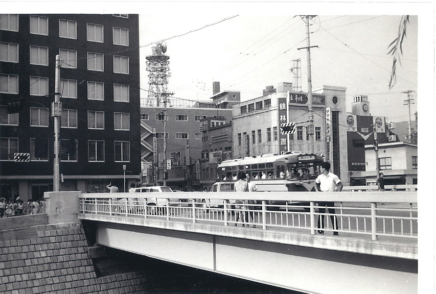 長野県松本市の市街中心部にある千歳橋。1967年8月の写真である。江戸時代には、手前が商人地、向こう側が武家地であった。